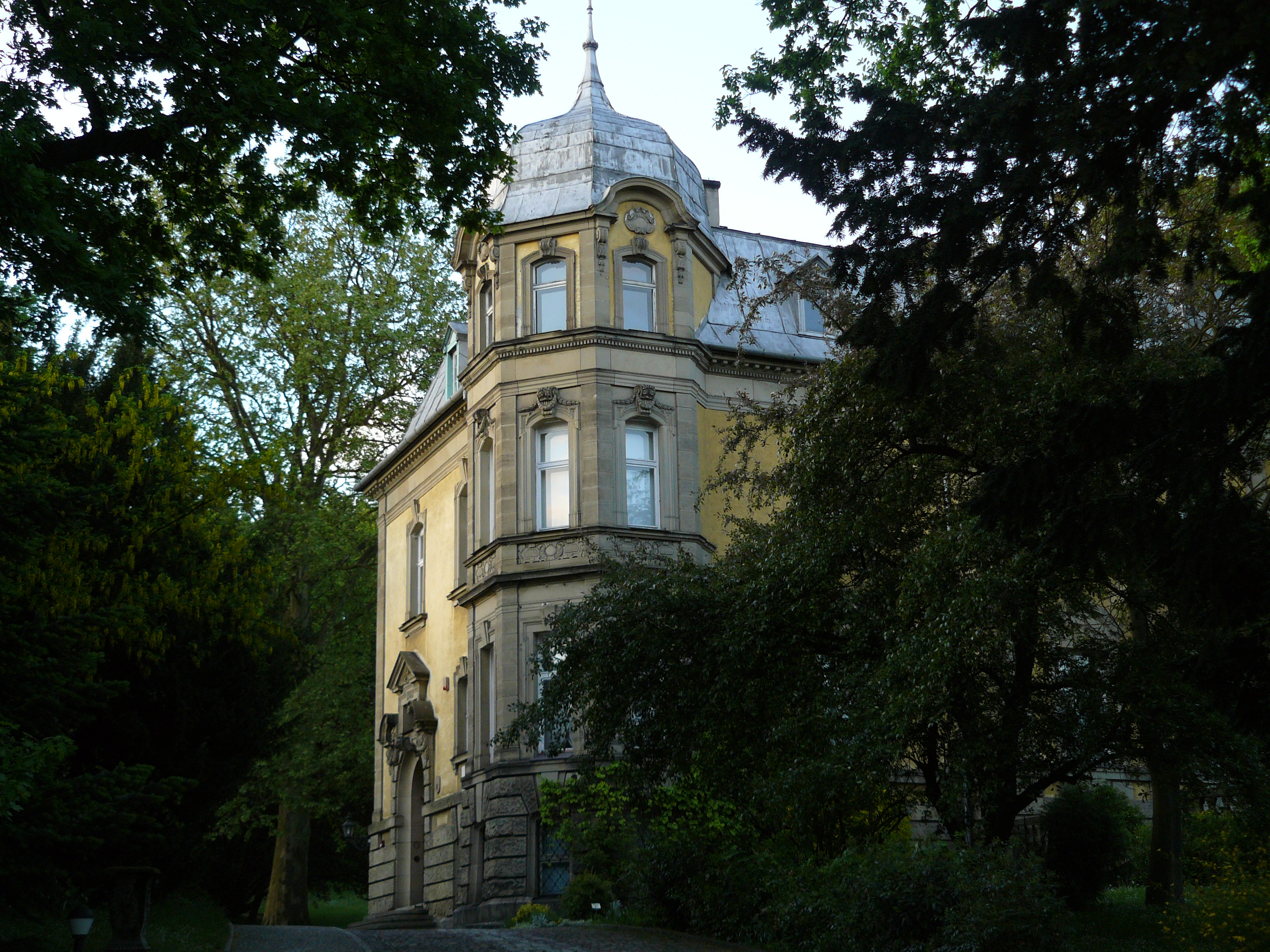 Willa Schrodedera, Muzeum Lubuskie w Gorzowie